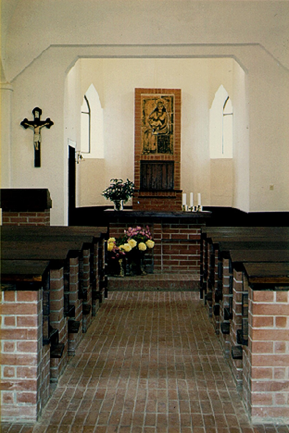 Ond, Magyarok Nagyasszonya római katolikus templom belsőtere, Rainer Péter munkája